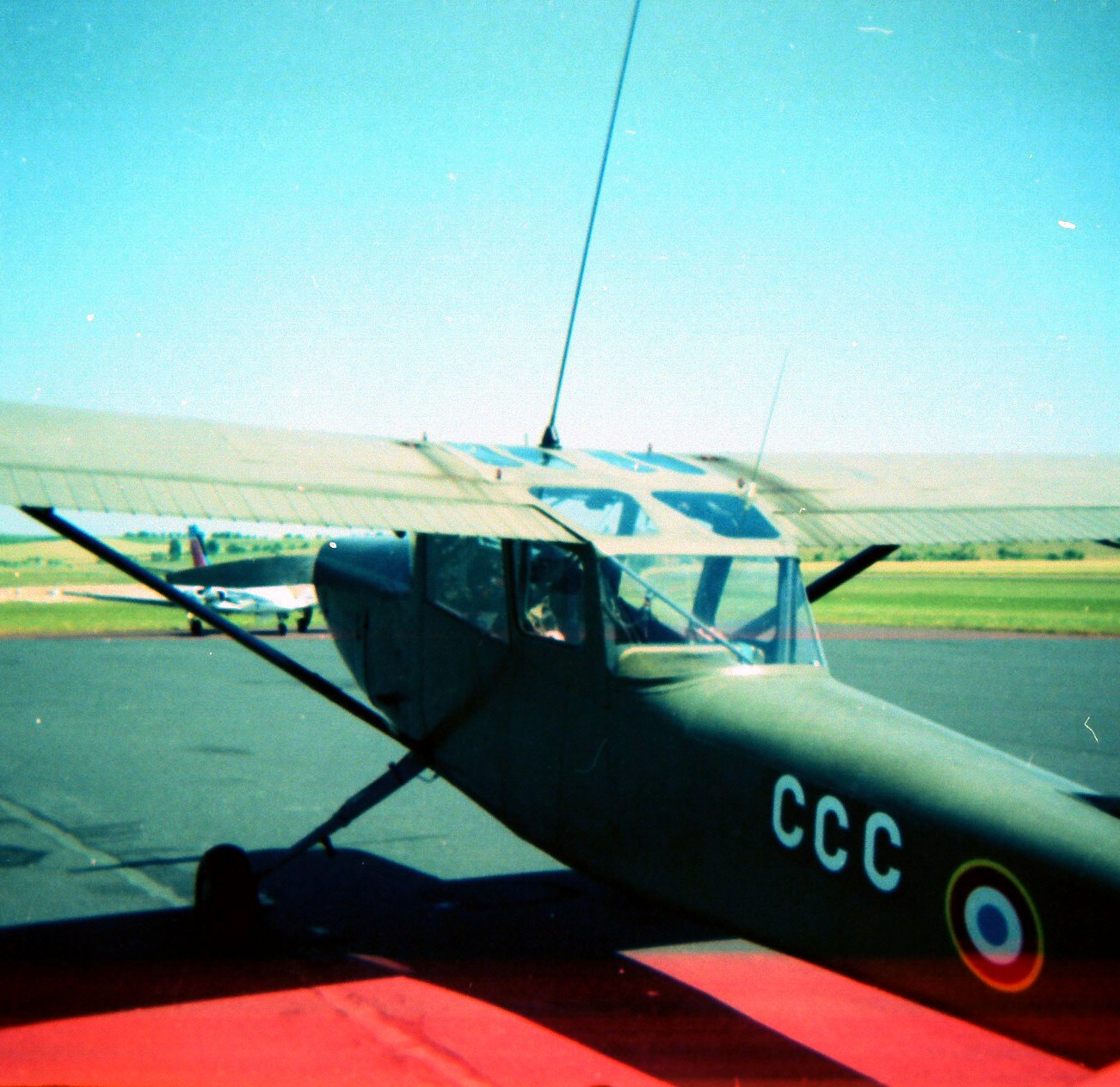 Cessna 0-1 Bird, Aviation Légère de l'Armée de Terre/French Army Light Aviation.